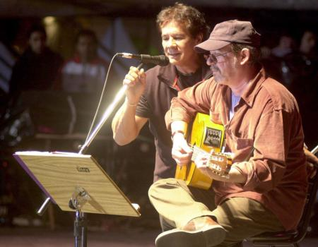 Victor Heredia y Silvio Rodríguez cantando en la Plaza de Mayo. Buenos Aires. Argentina. 25 de mayo de 2006. foto oficial